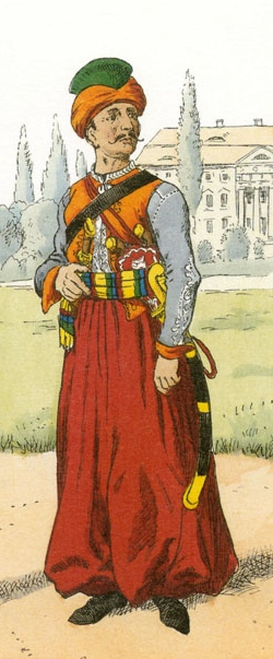 Mamelouk de la Garde impériale en 1806. Illustration réalisée d'après une planche d'Henschell.